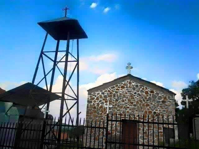 Црква светог Николе у селу Готовуша, општина Штрпце, Србија